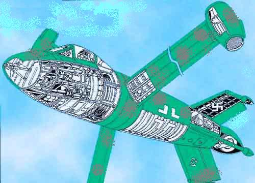 Focke Wulf Triebflugel V1